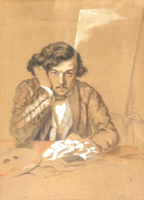 Theodor Aman (1831-1891) - Autoportret, semnat dreapta jos în monograma cu creion, laviu şi guaşă, datat 1851, 16.5x11.5cm